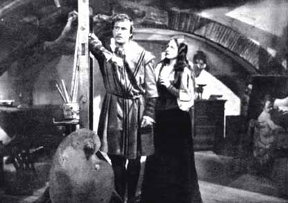 Amedeo Nazzari e Beatrice Mancini in "Caravaggio, il pittore maledetto" (Alessandrini, 1941)